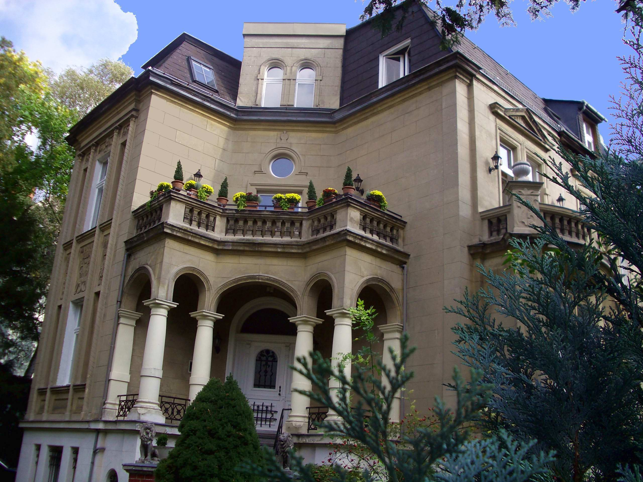 Villa in Lichterfelde West/Berlin, Germany. erbaut von Robert Poseck 1901/1902